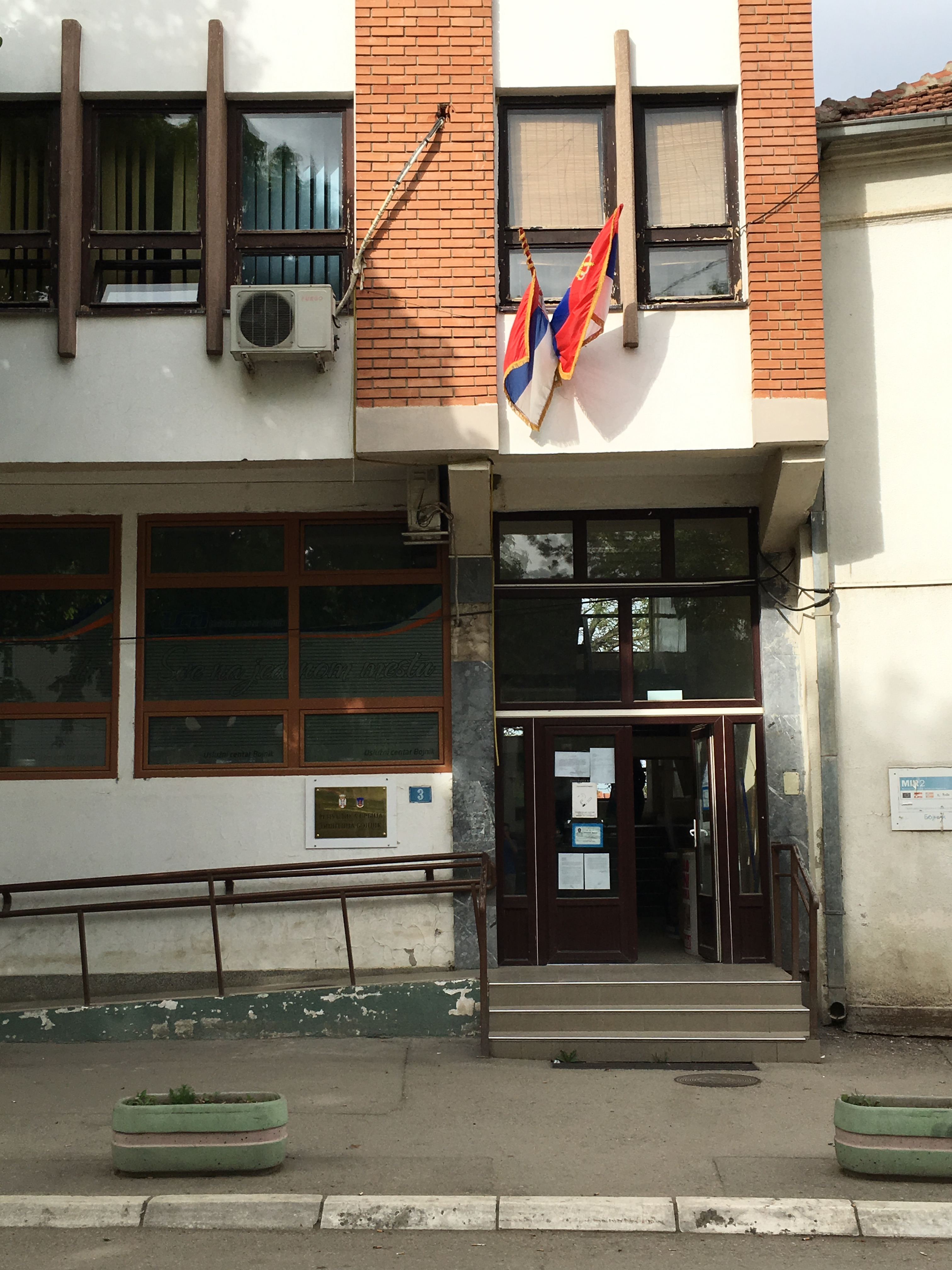 Srpski (latinica): Opština Bojnik, Leskovac